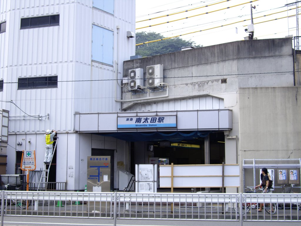 南太田駅入口